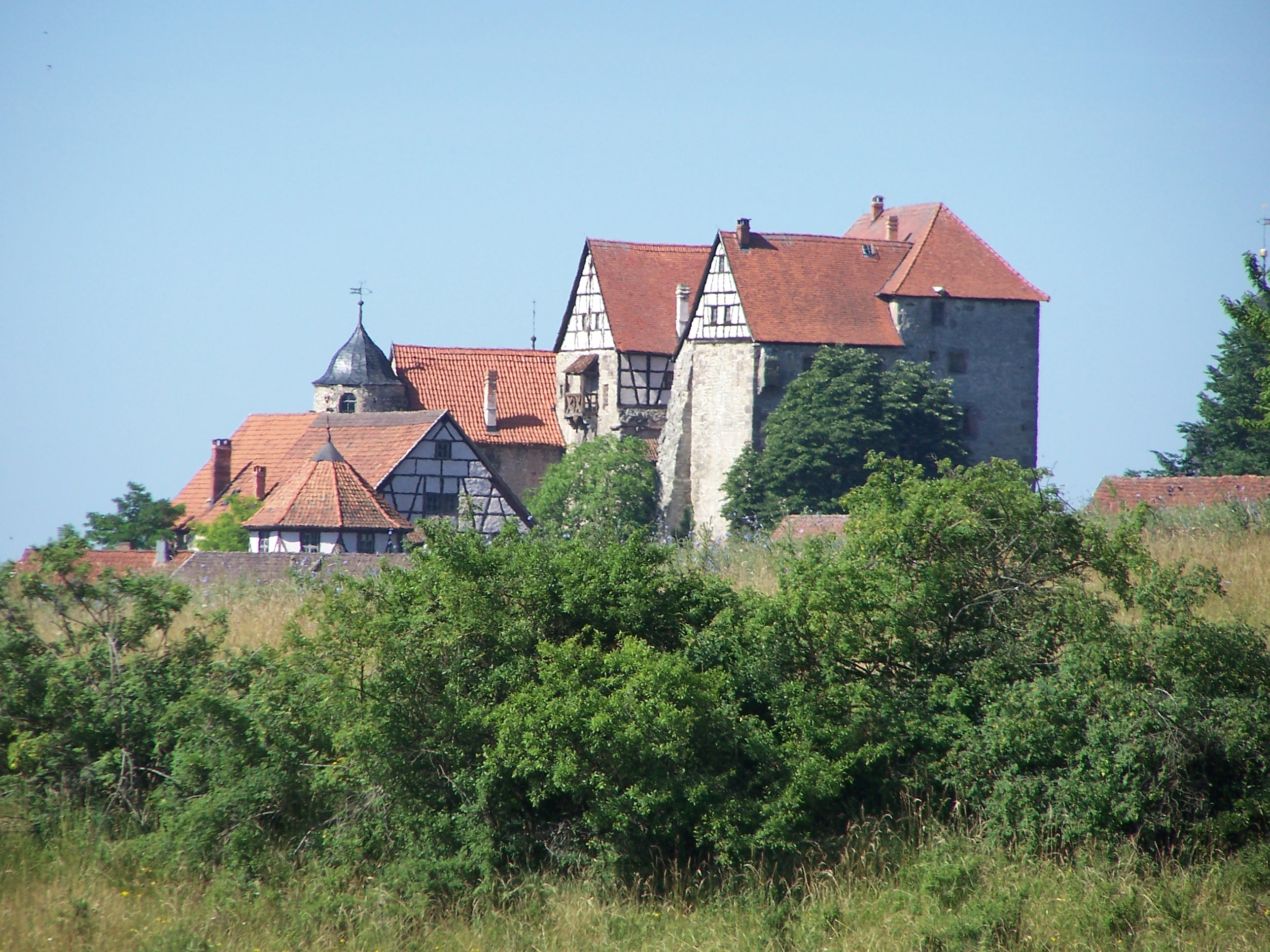 Johanniterburg. Ansicht von Nordosten.